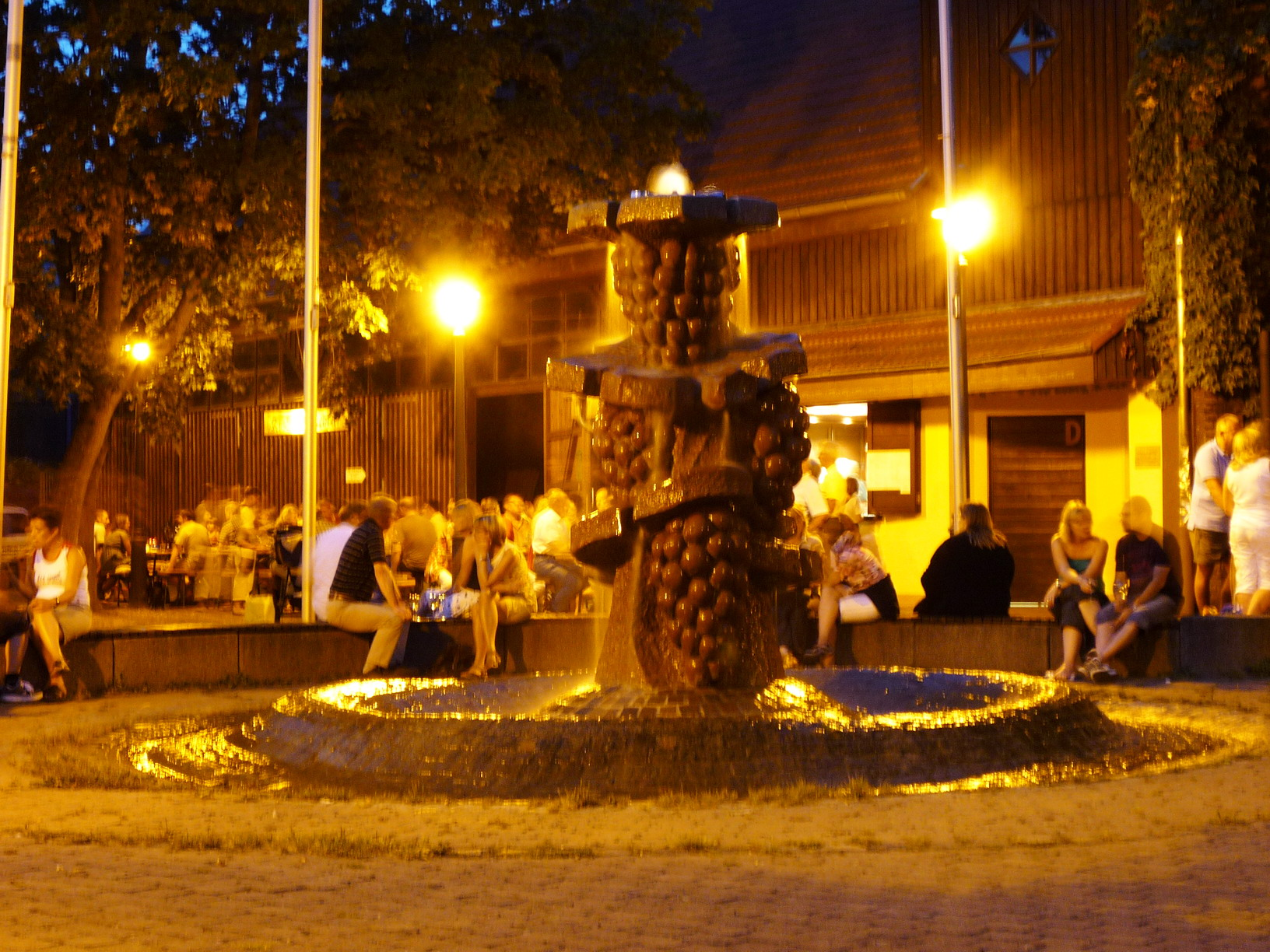 „Weinbrunnen“ des Bildhauers Erwin Mosen – Fast am Ende des Mainradwegs in Mainz-Kostheim, das noch zu Wiesbaden gehört. Man trifft sich abends am Weinbrunnen bei einer Weinschorle.